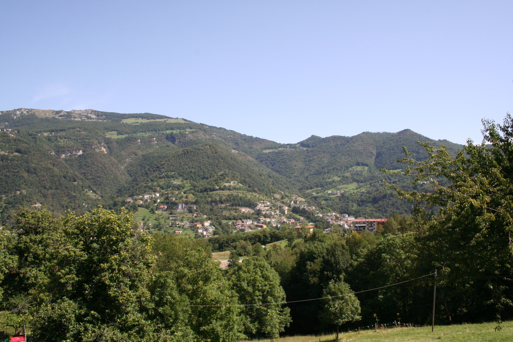 Locatello, panorama.